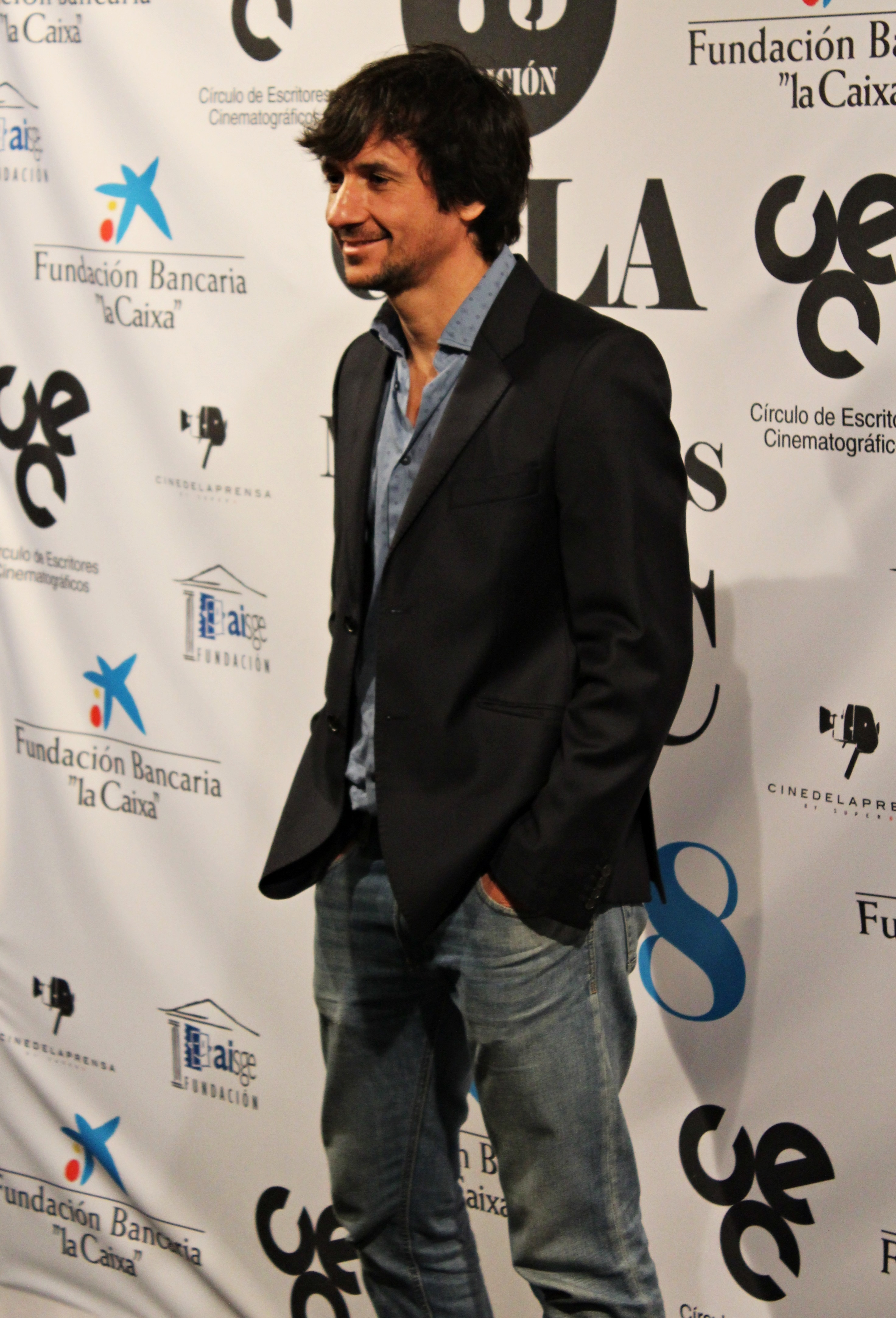 El cineasta español Carlos Agulló en la 73 edición de las Medallas del Círculo de Escritores Cinematográficos.